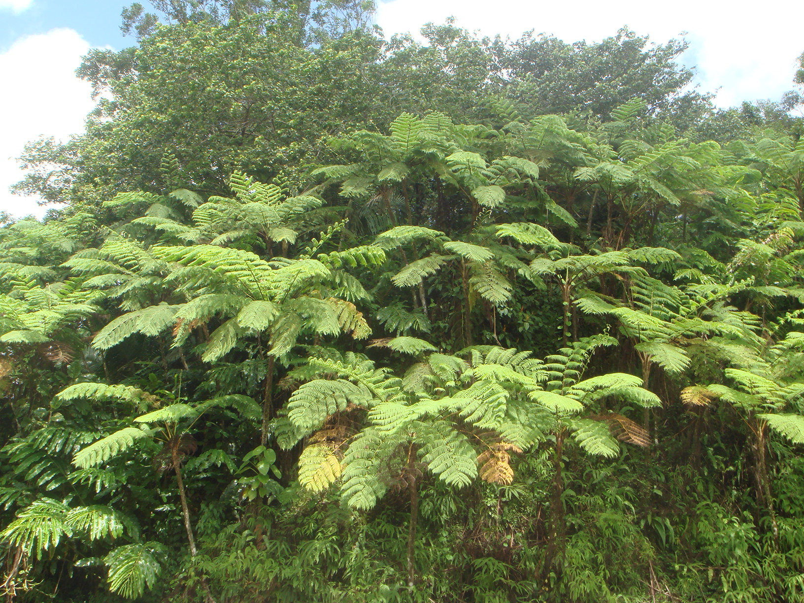 Helecho gigante (Cyathea arborea), Bosque Pluvial El Yunque, Puerto Rico.